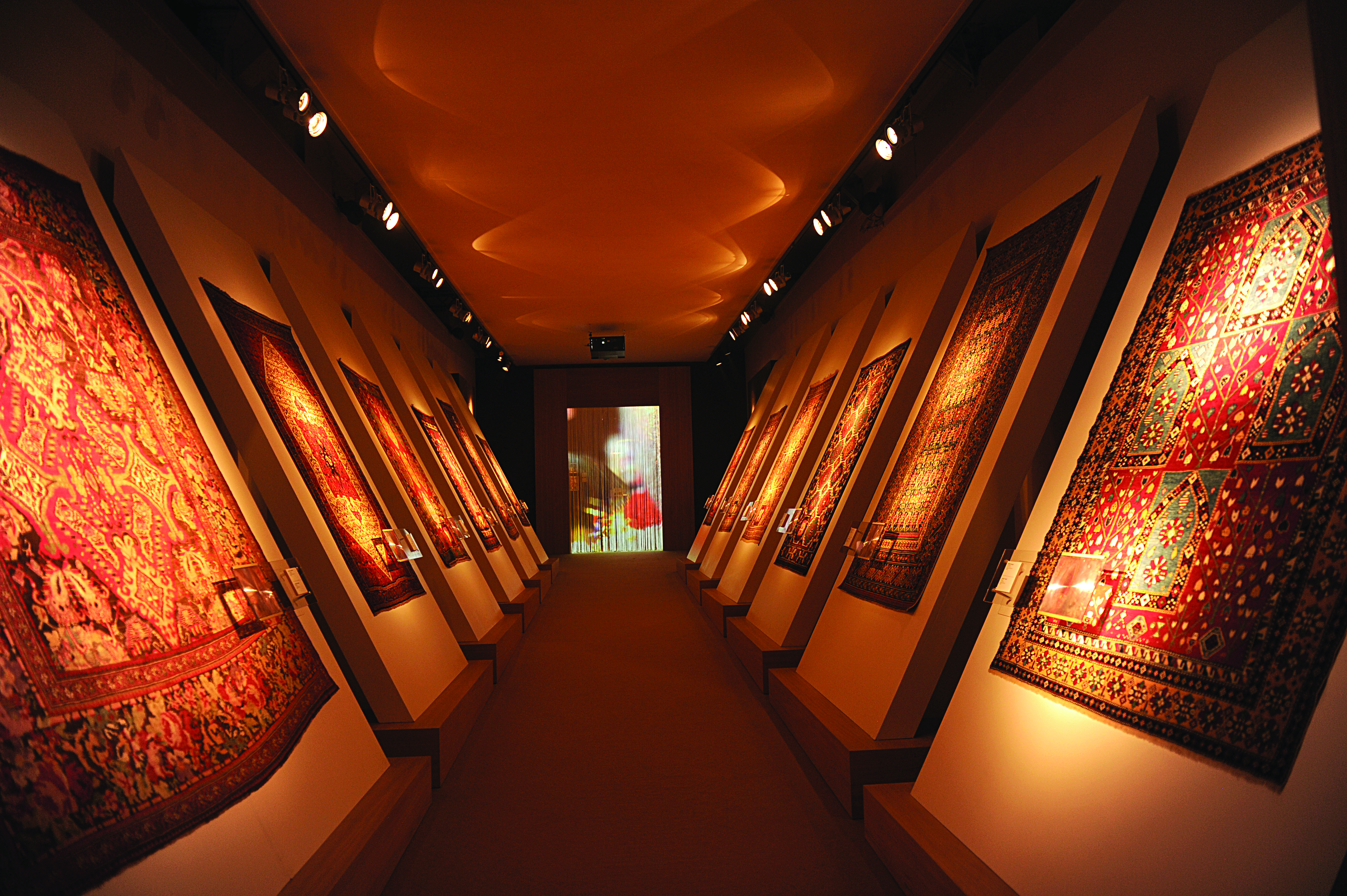 Vatikanda “Azərbaycanın zəngin incilərinə tarixi baxış” sərgisi